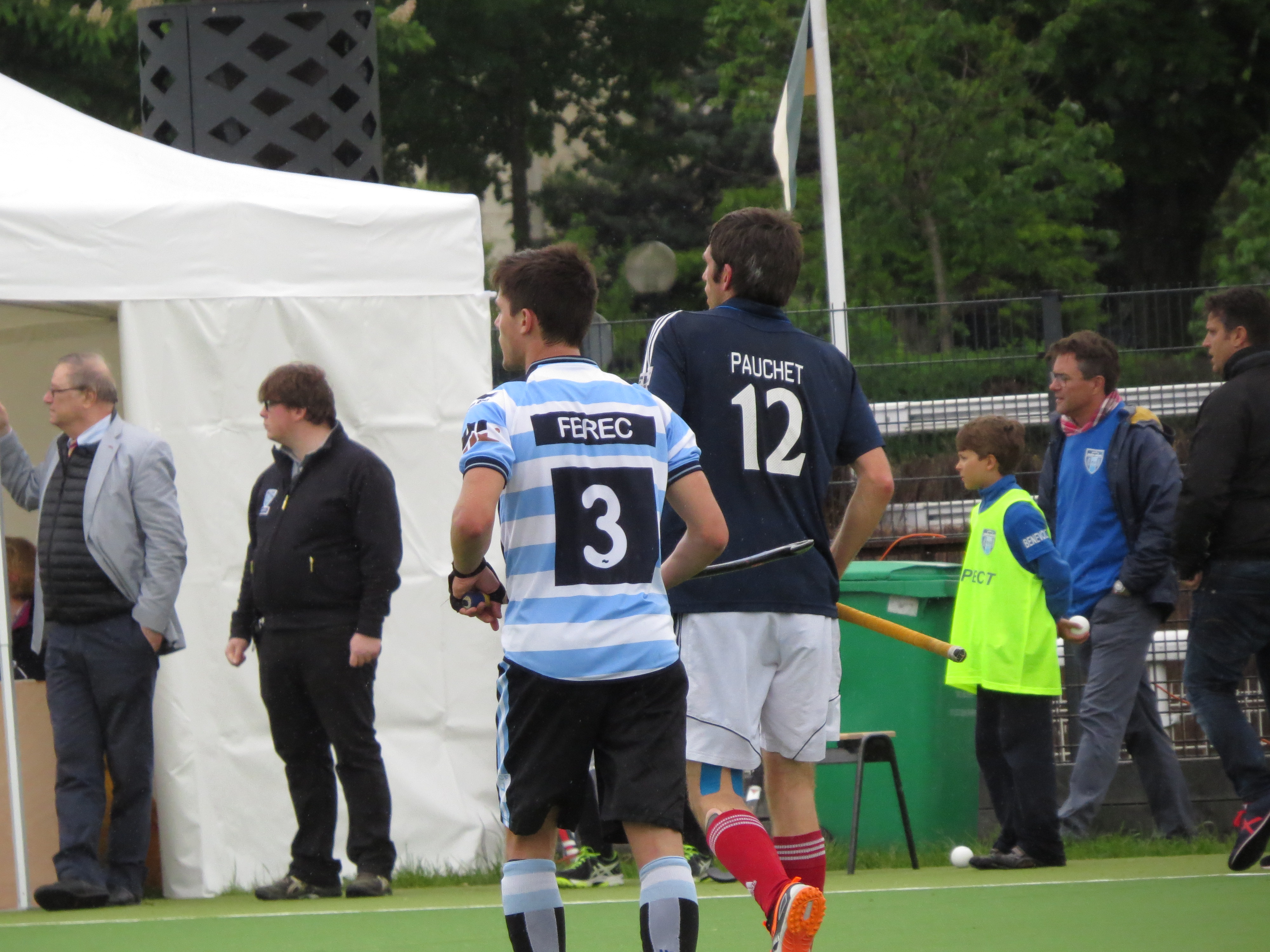 Finale du championnat de France masculin de hockey sur gazon 2014-2015 sur le terrain du PJB Victoire du Racing 3-1